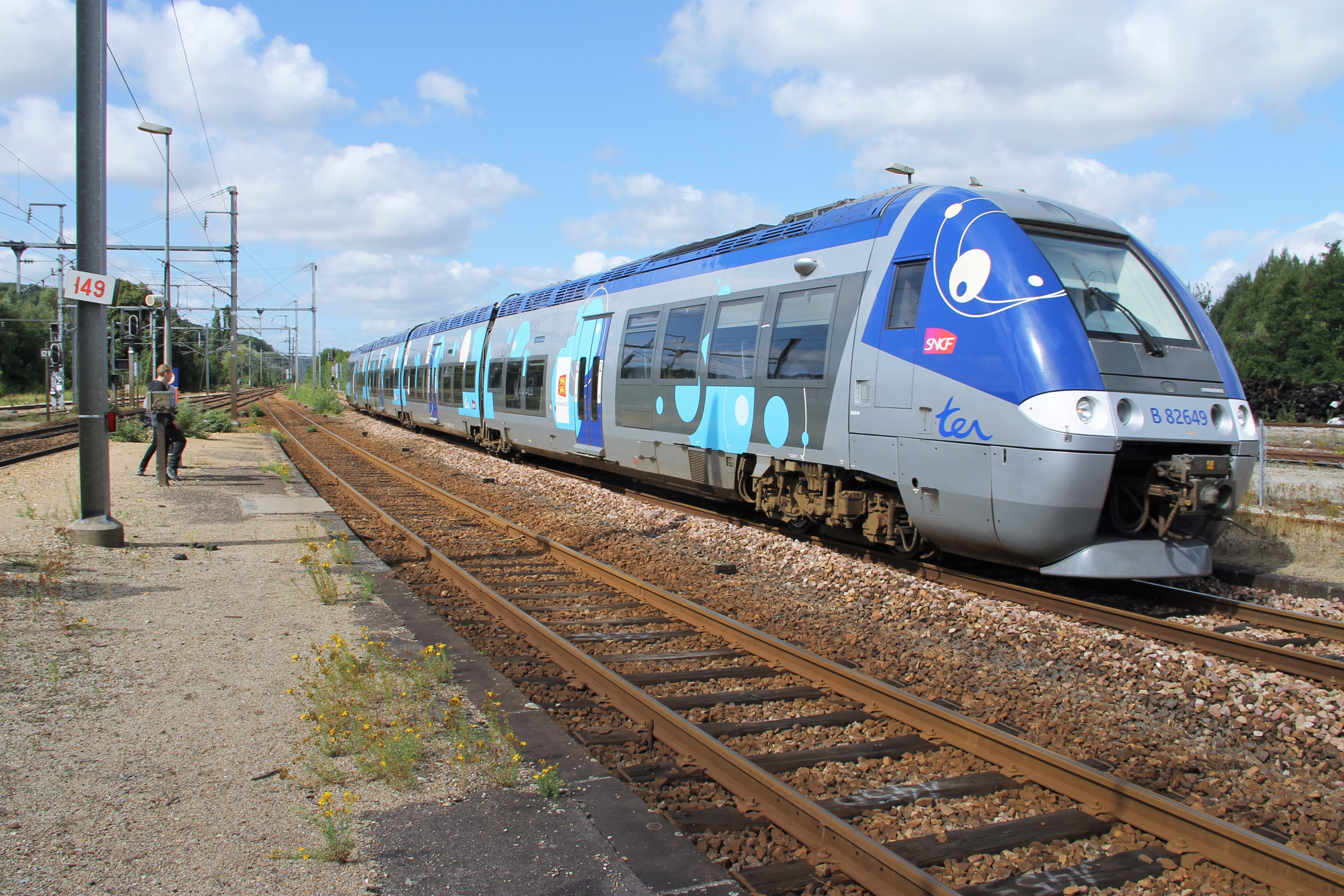 Arrivée d'un TER Caen-Rouen en gare de Serquigny, département de l'Eure, France.